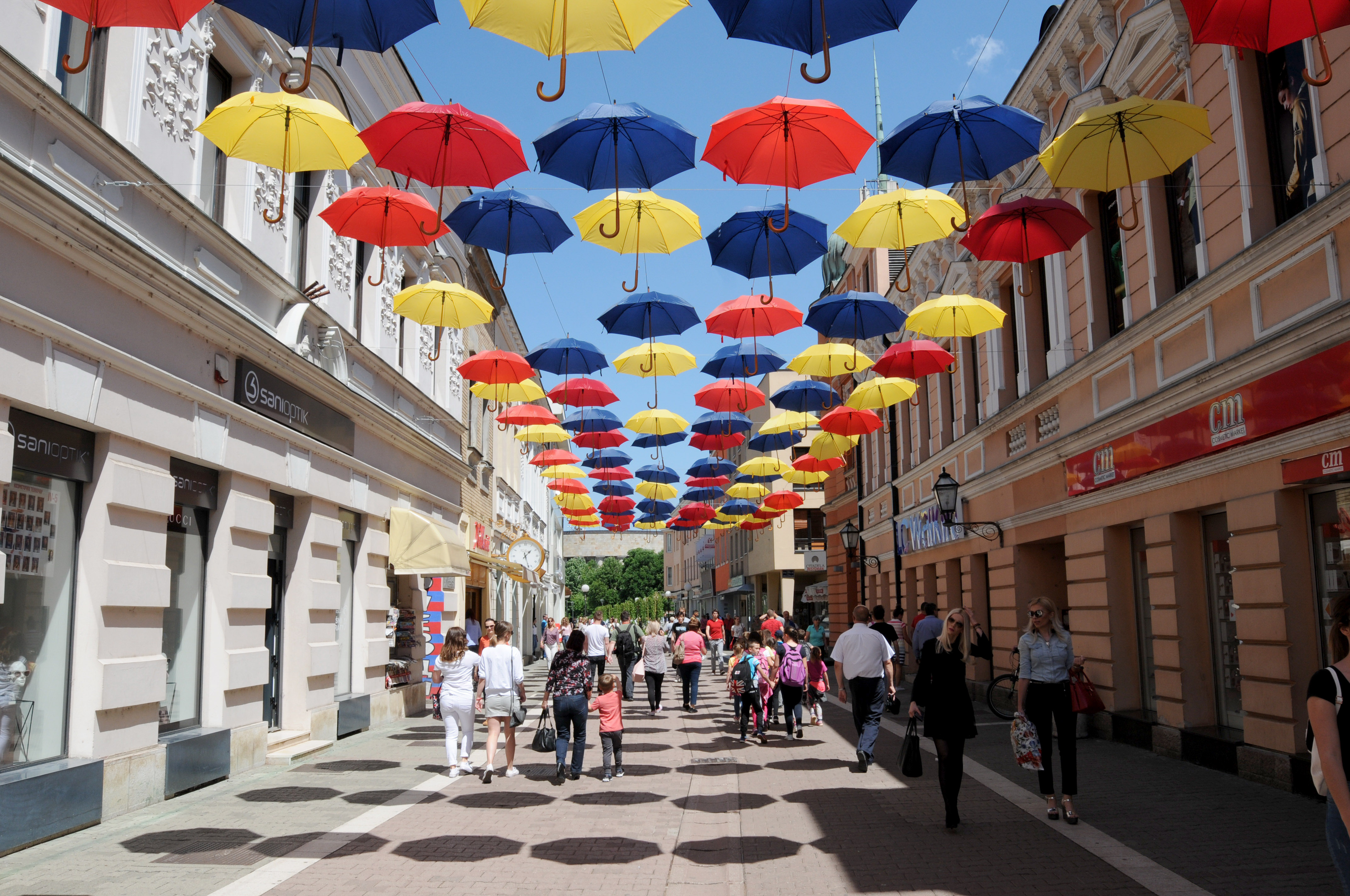 gospodska ulica banja luka pjesacka zona